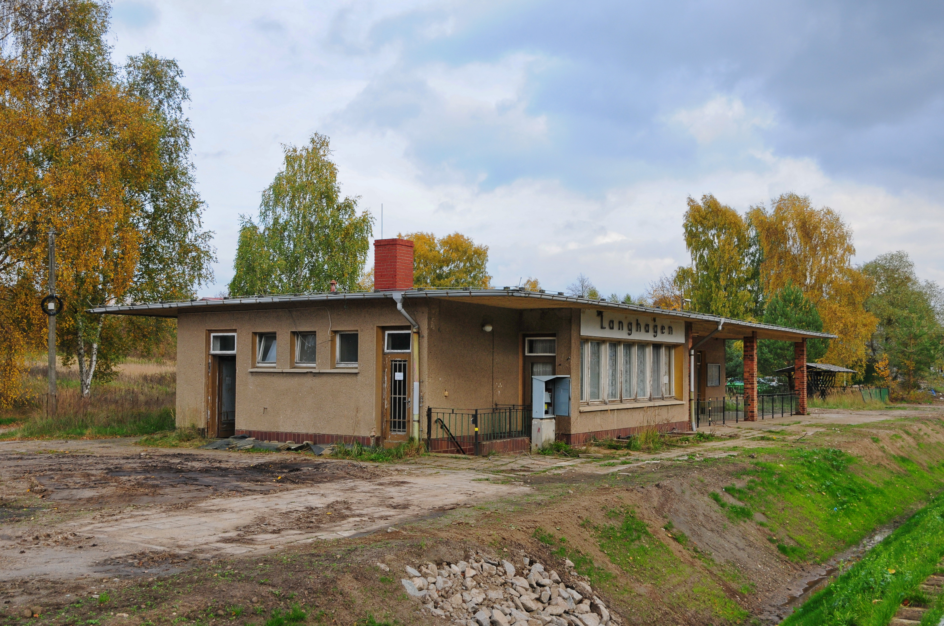 Das Empfangsgebäude gibt sich im Oktober 2013, nach Abschluss der Bauarbeiten, unverändert.